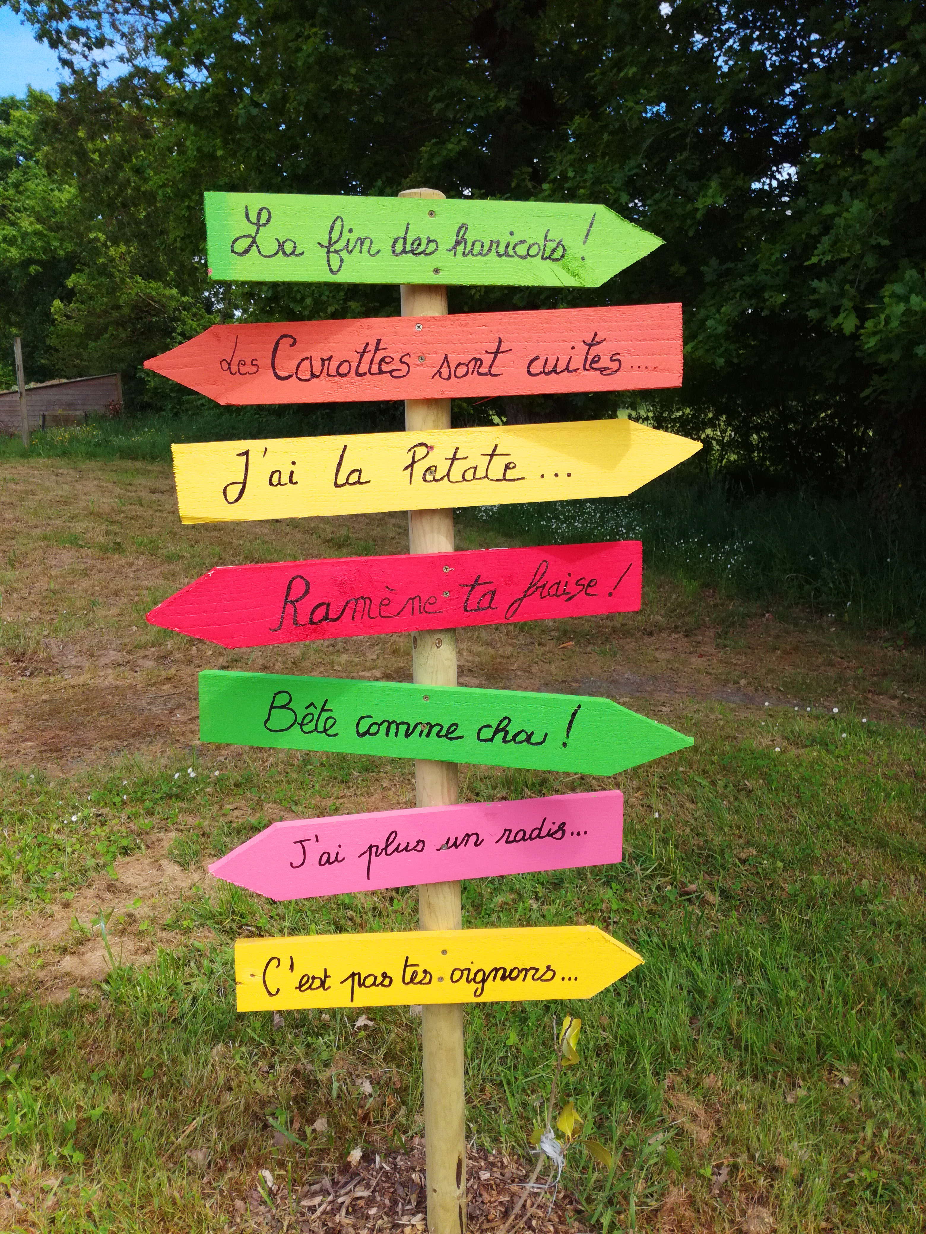 Mordelles - En longeant le Meu